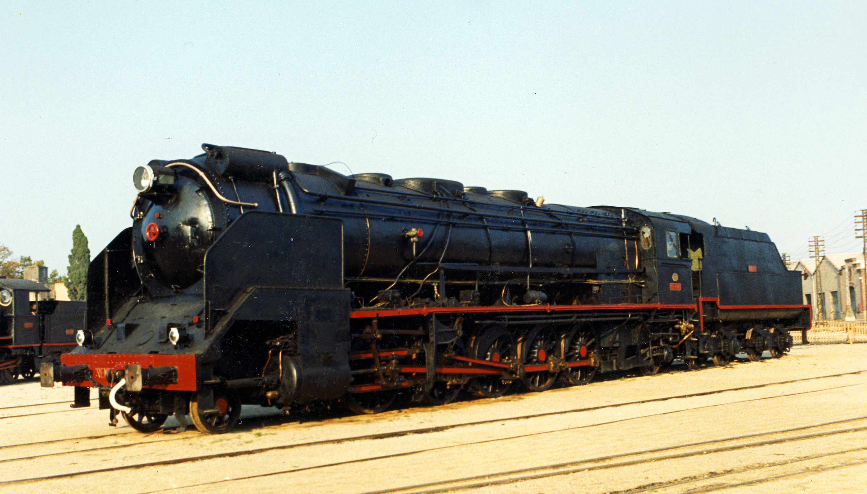 Locomotora de Vapor 151F-3101